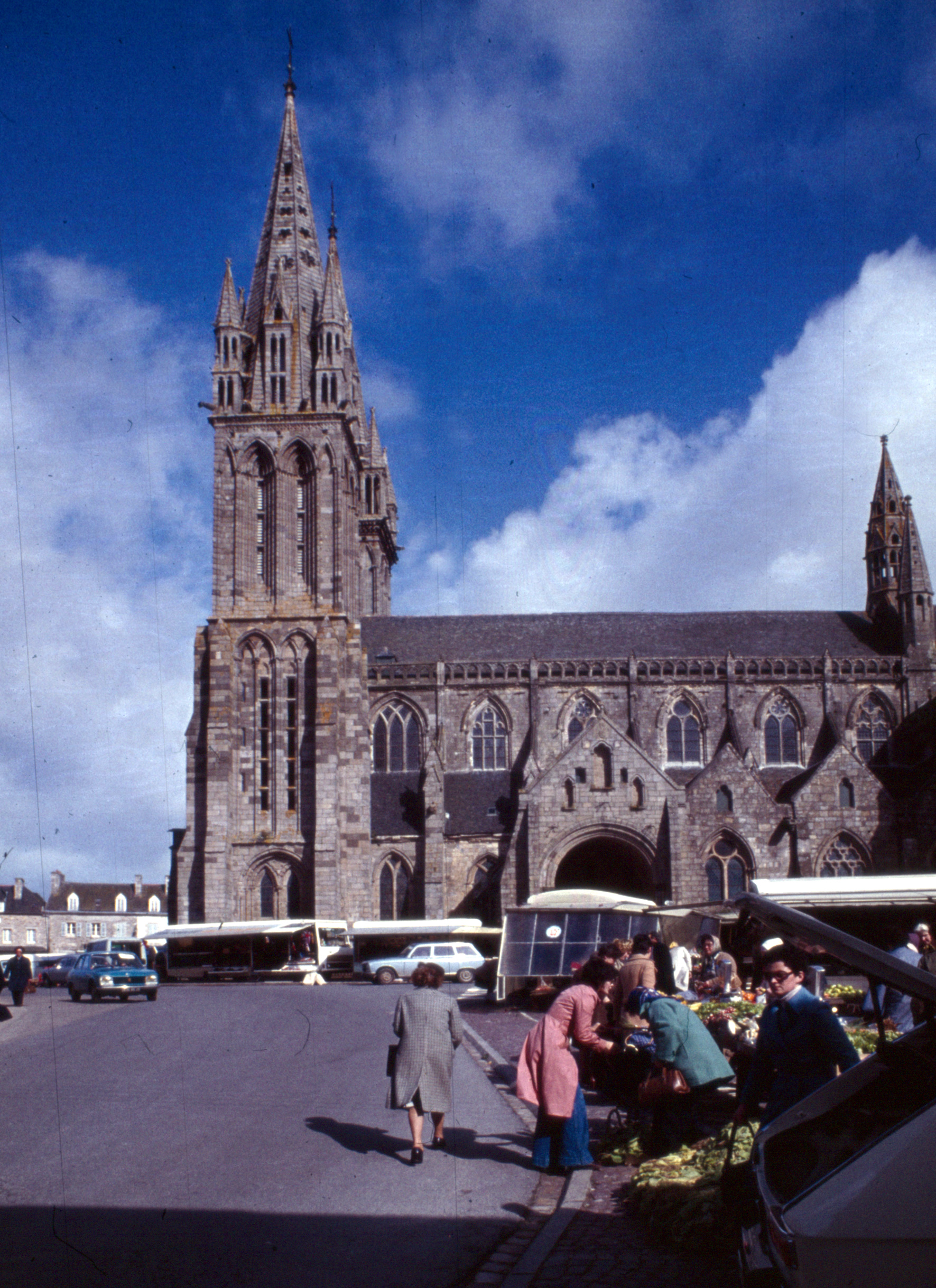 Saint-Pol-de-Léon